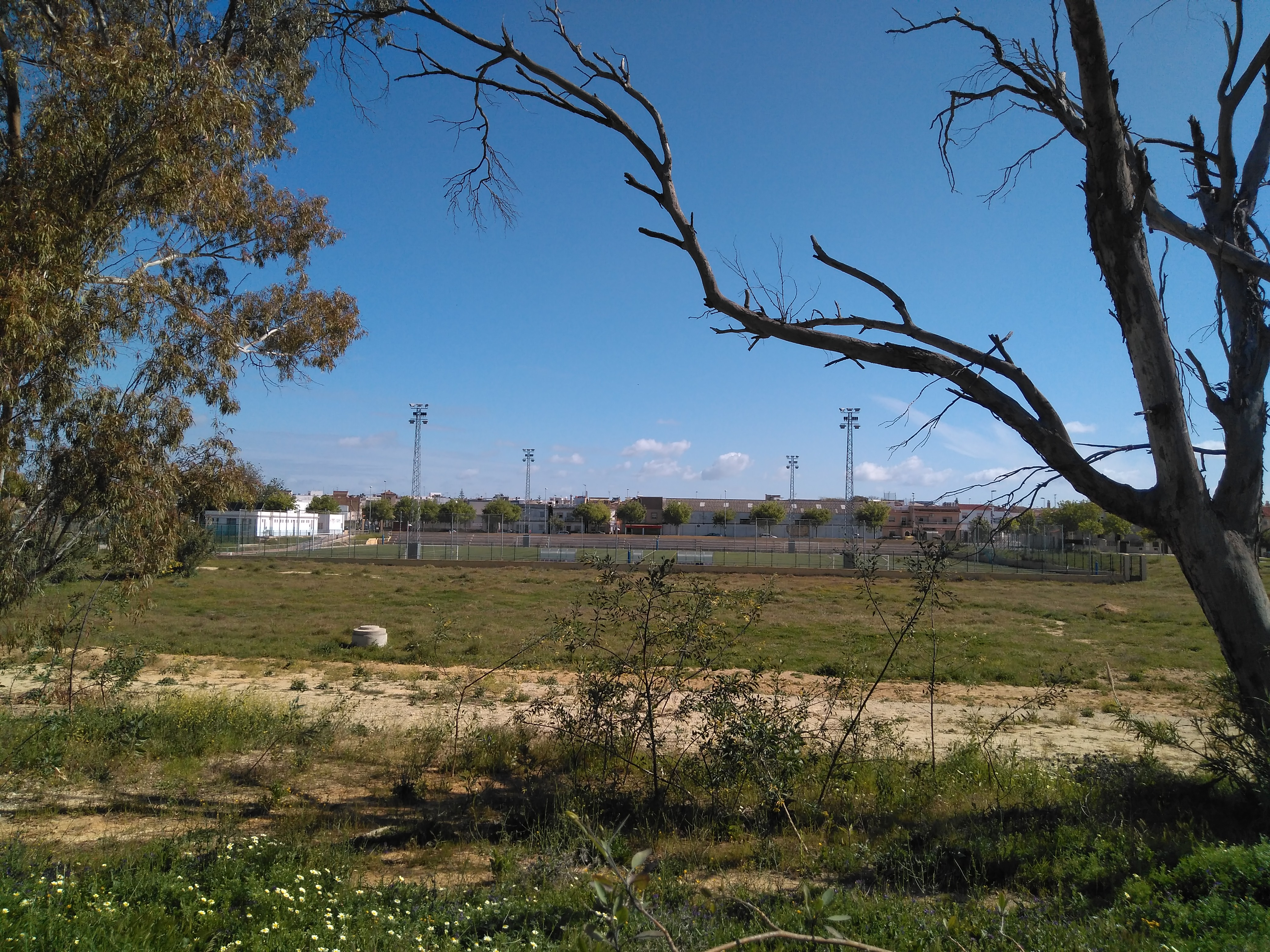 Campo de fútbol La Canaleja, Jerez de la Frontera